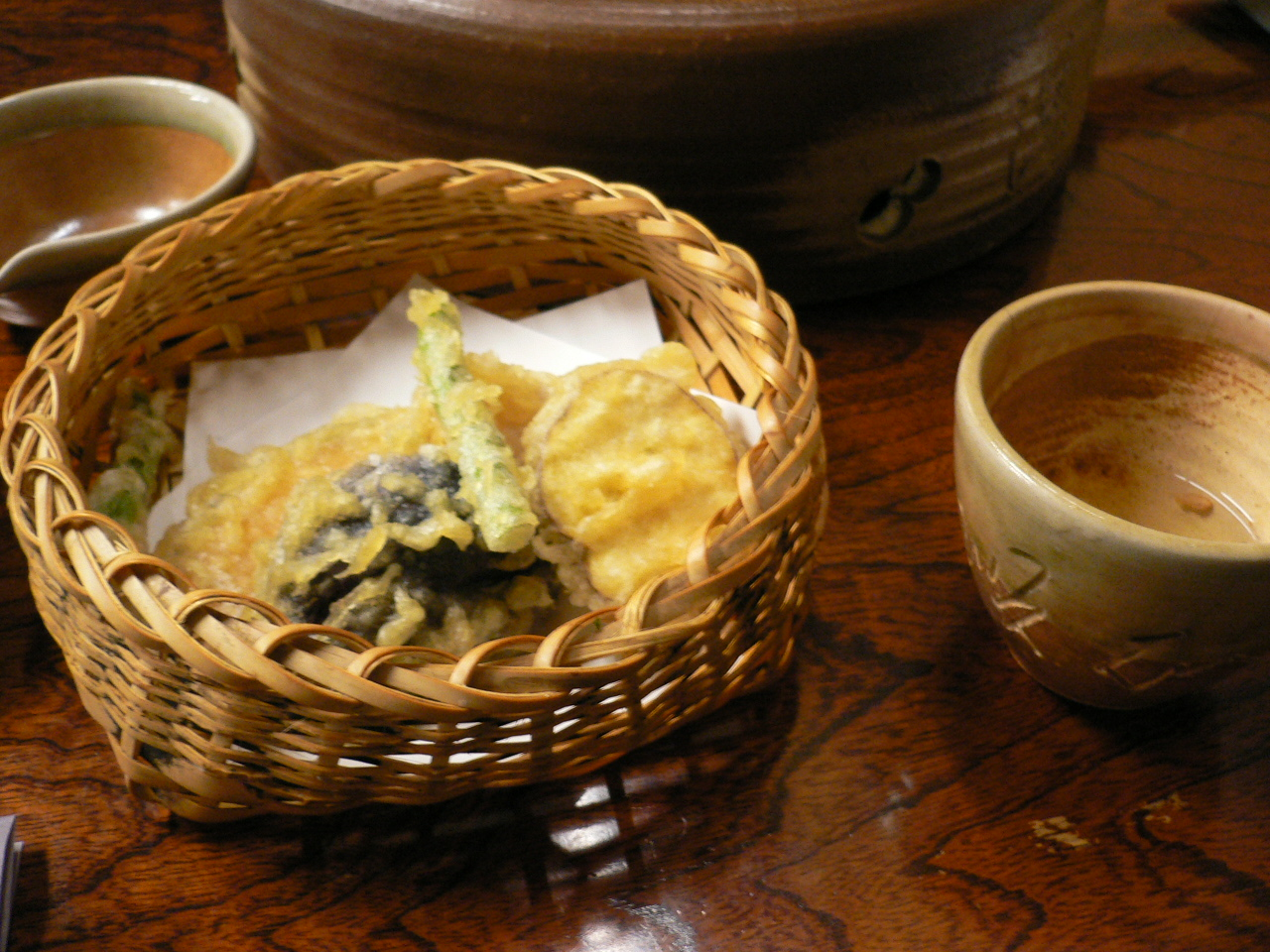 at junsei